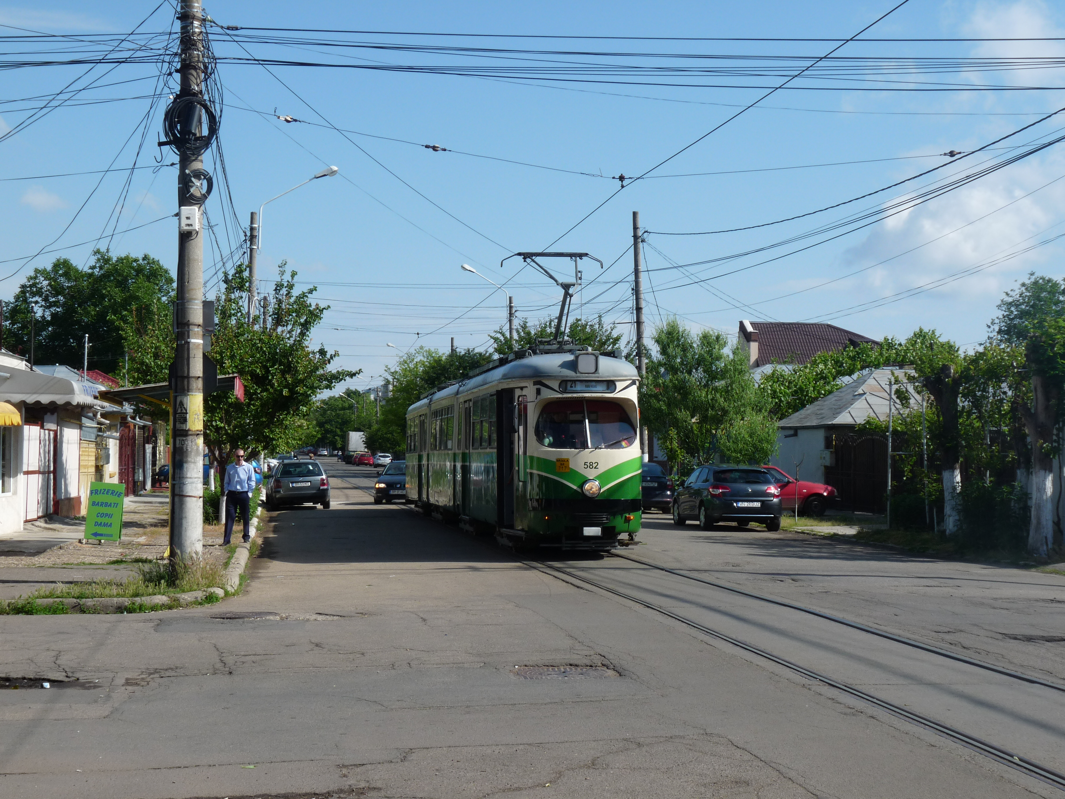 Enkelsporig tramlus in Strada Industriel in Brăila